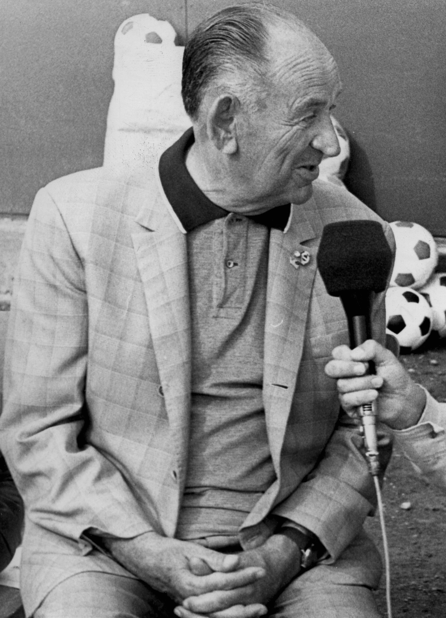 a Magyar Rádió Bácsi kérem, hol lehet itt focizni? című műsora, Bukovi Márton labdarúgó edző és Szepesi György sportriporter. Location: Hungary Tags: Hungarian Radio Title: a Magyar Rádió Bácsi kérem, hol lehet itt focizni? című műsora, Bukovi Márton labdarúgó edző és Szepesi György sportriporter.